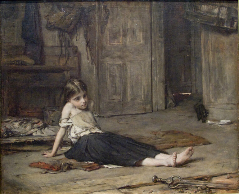 Faces in the Fire. Музей Эшмола, Оксфорд, размер — 46,5 x 67,5 cм, полотно подписано и датировано: «F. Holl 1867»